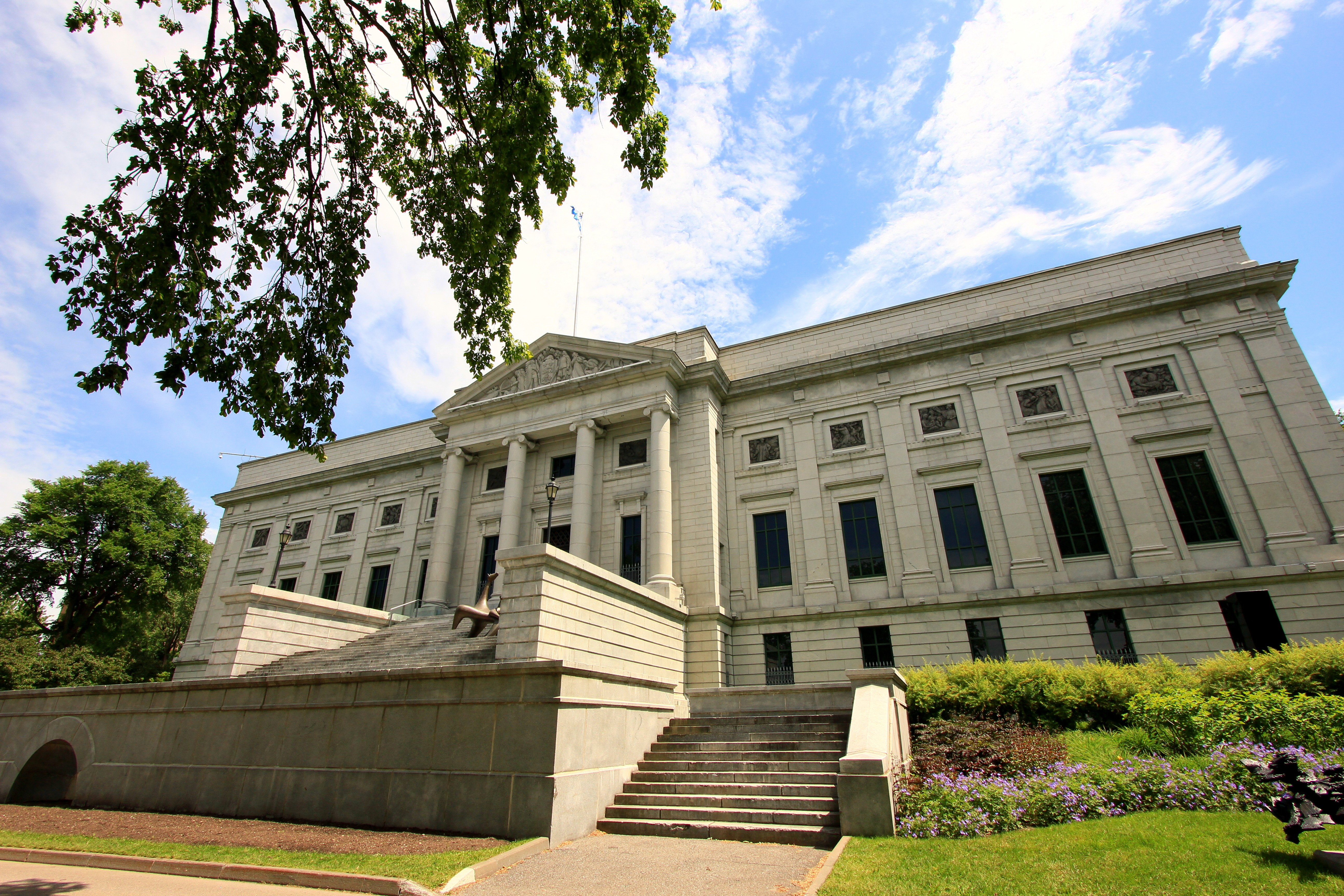 Le musée national des beaux-arts du Québec, sur les plaines d'Abraham.